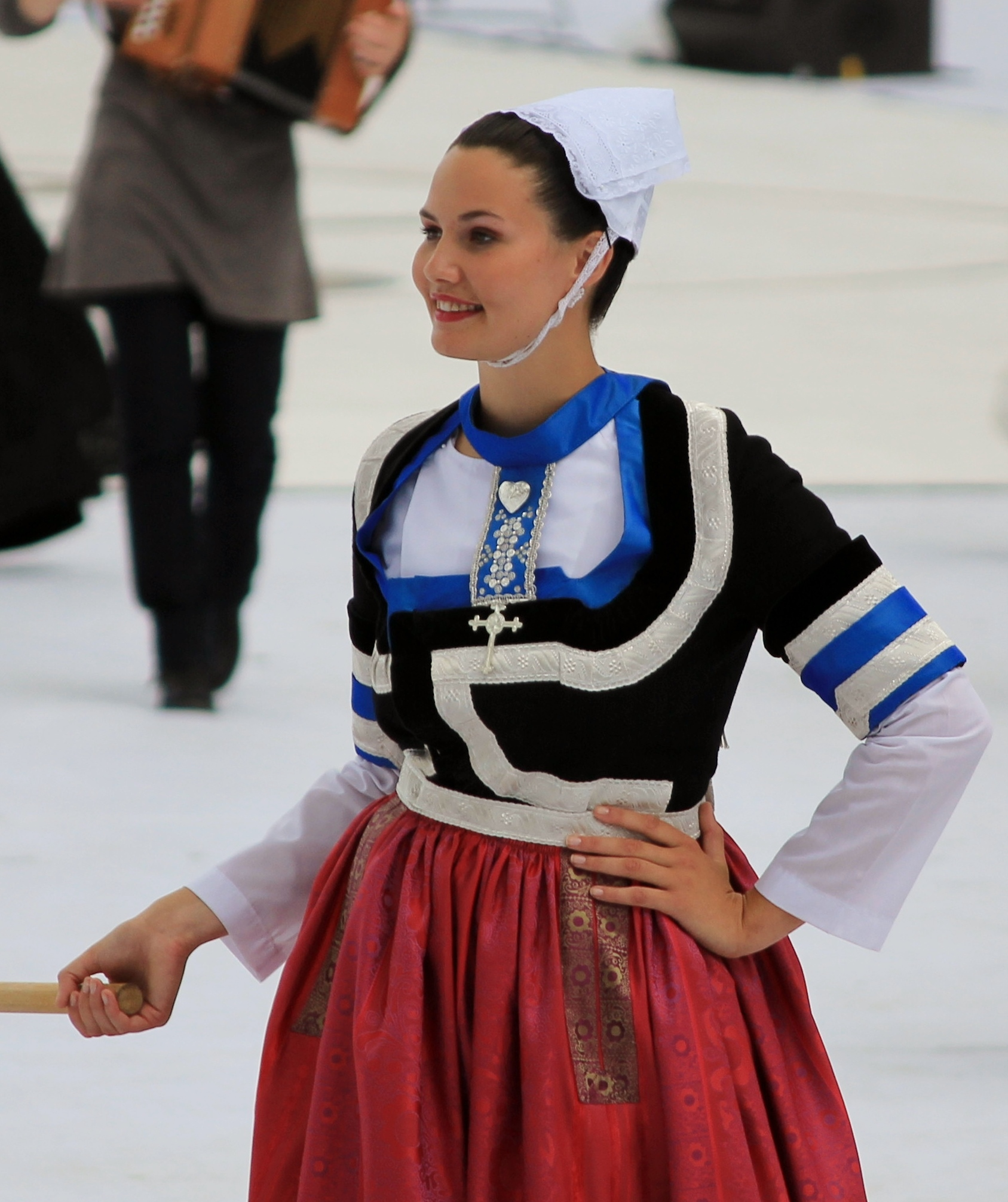 Cercle celtique Danserien Kemper lors de la grande parade du festival interceltique de Lorient 2013.